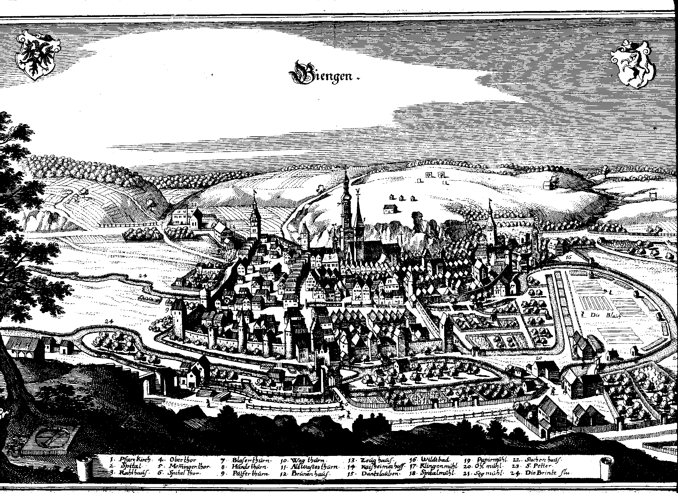 Kupferstich nach Matthäus Merian